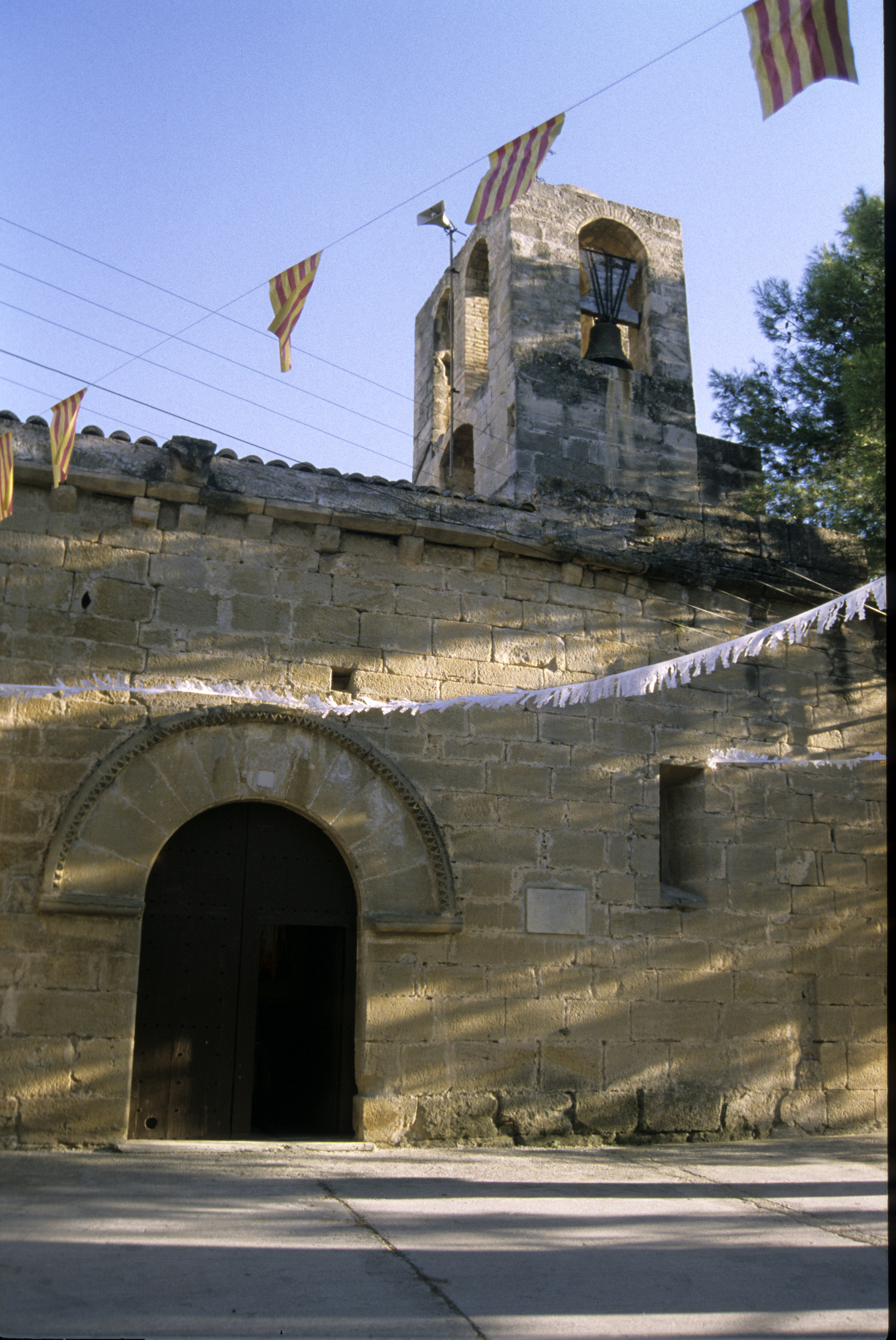 Caseres (Terra Alta). Parroquial de Sta. Magdalena, façana principal. Fot. 1996.